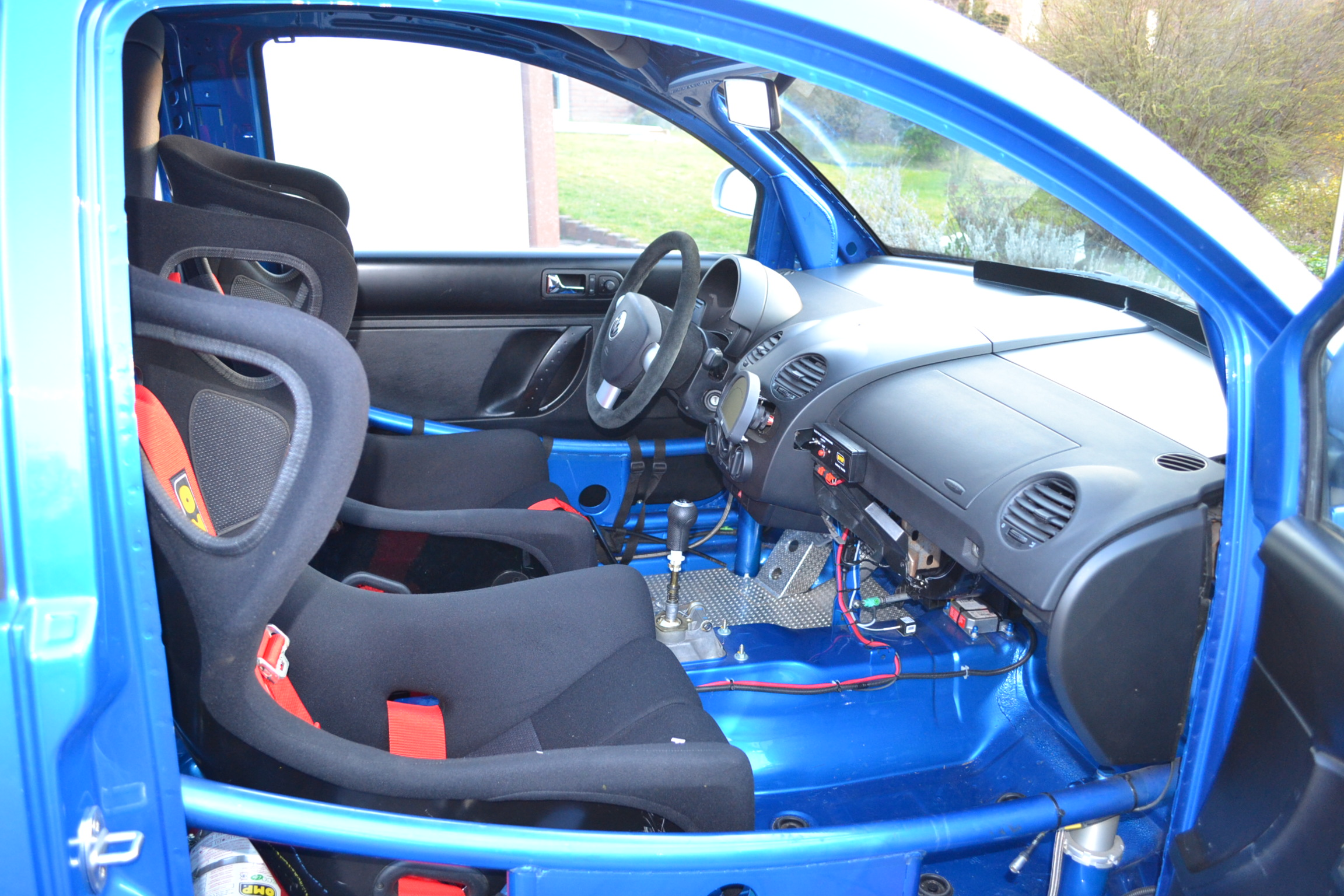 Originalzustand New Beetle Cup 2002, lediglich 2. Sitz nachträglich eingebaut